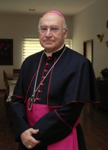 Obispo catolico